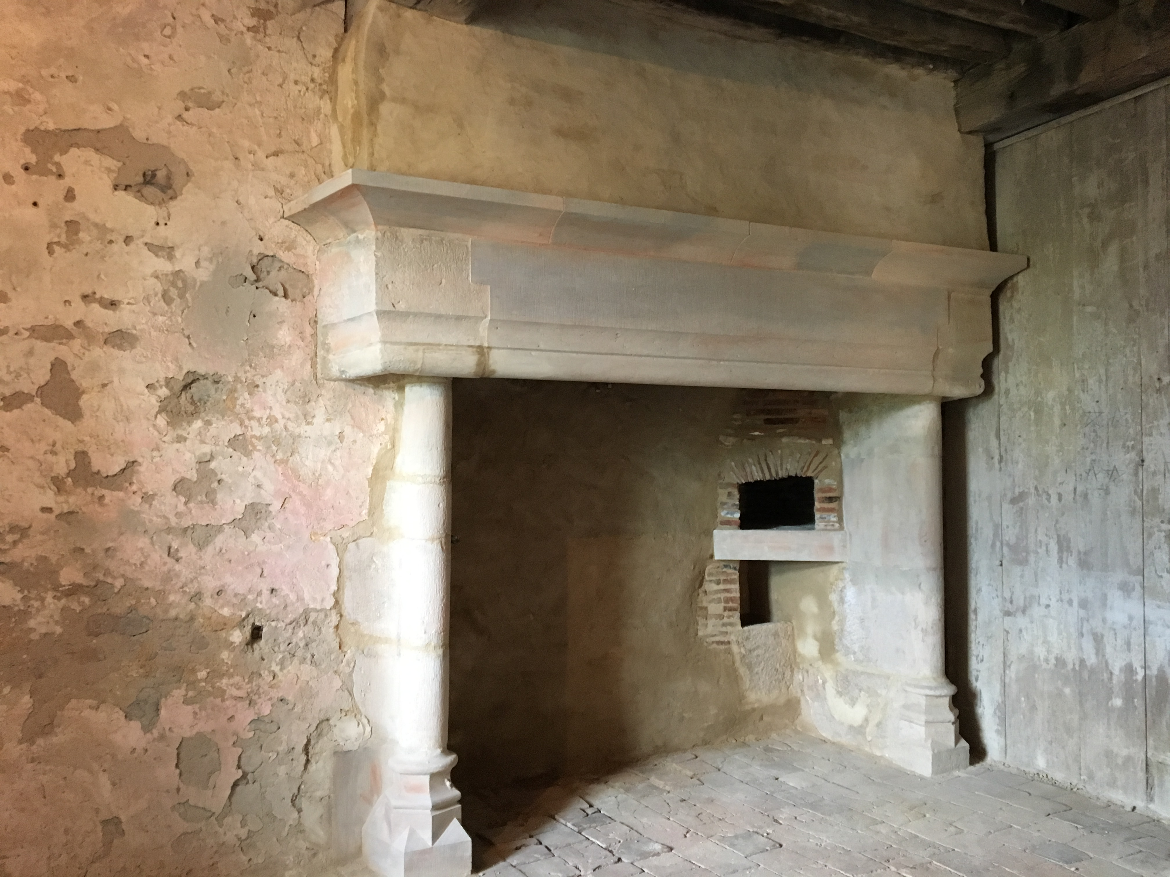 cheminée restaurée en 2018